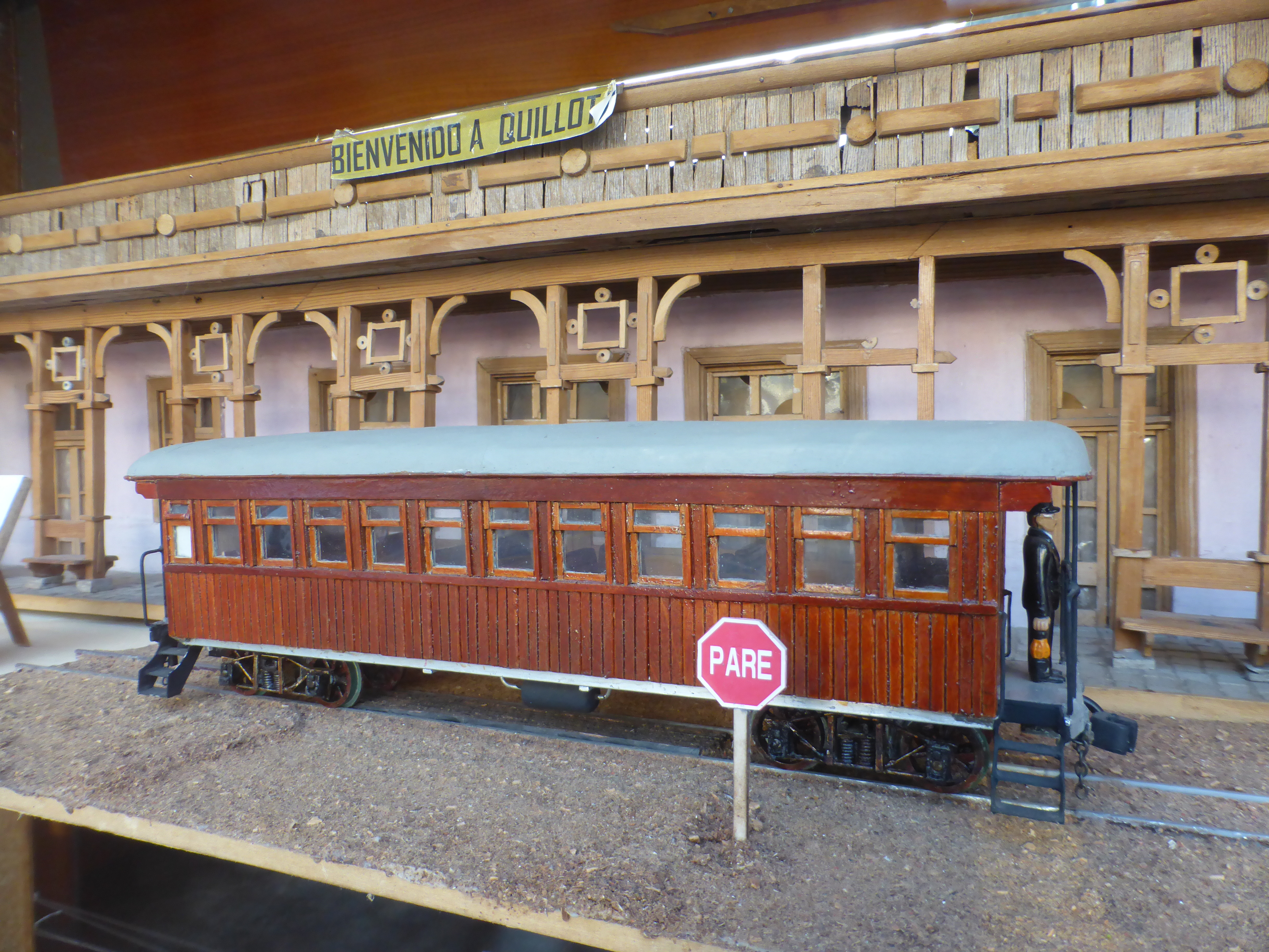 Oficina de Turismo de Quillota. Maqueta o modelo de la antigua y desaparecida estación de ferrocarril. Reproducción a escala. Municipalidad de Quillota.